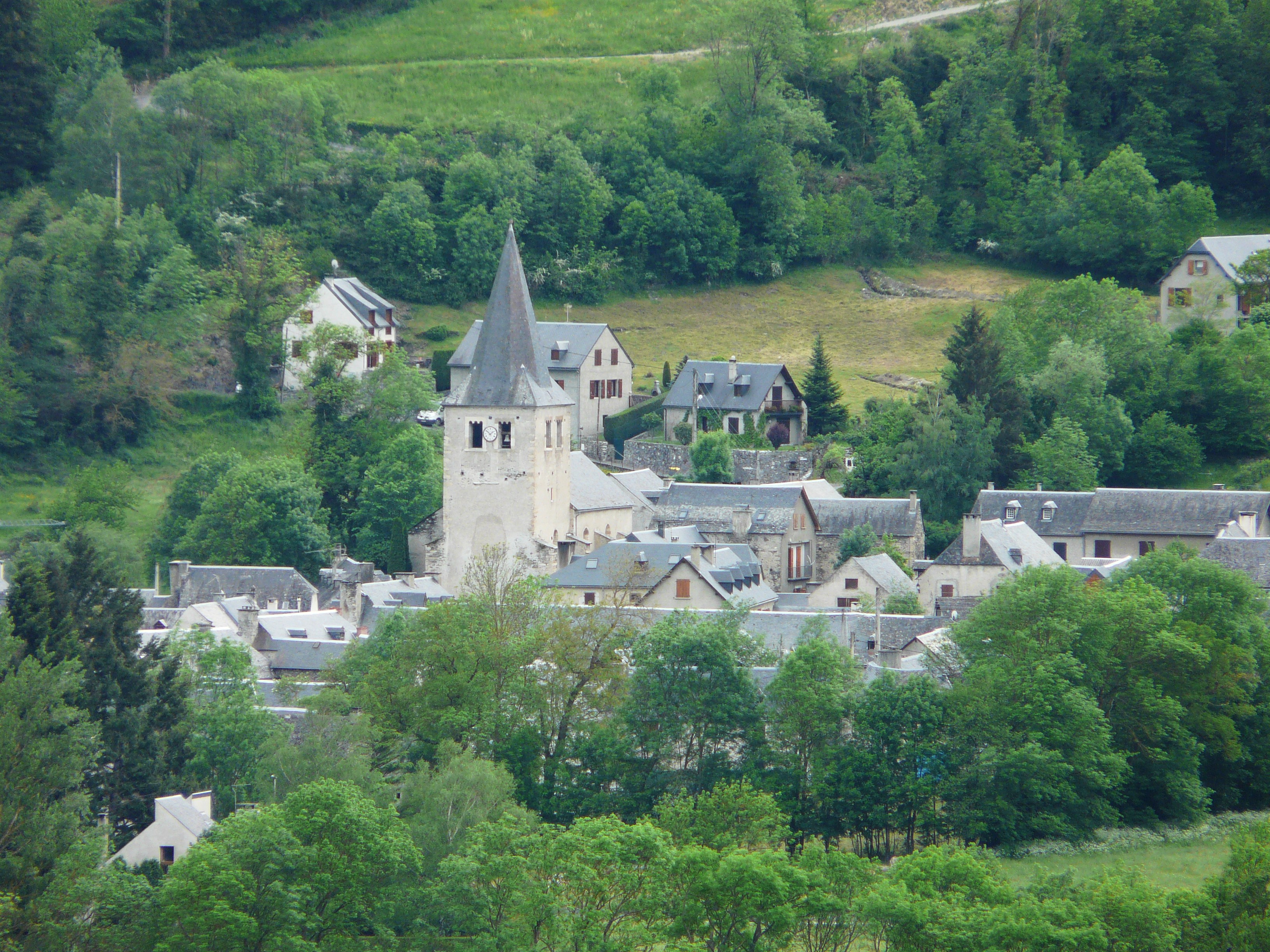 Le village de Bourisp, Hautes-Pyrénées, France.